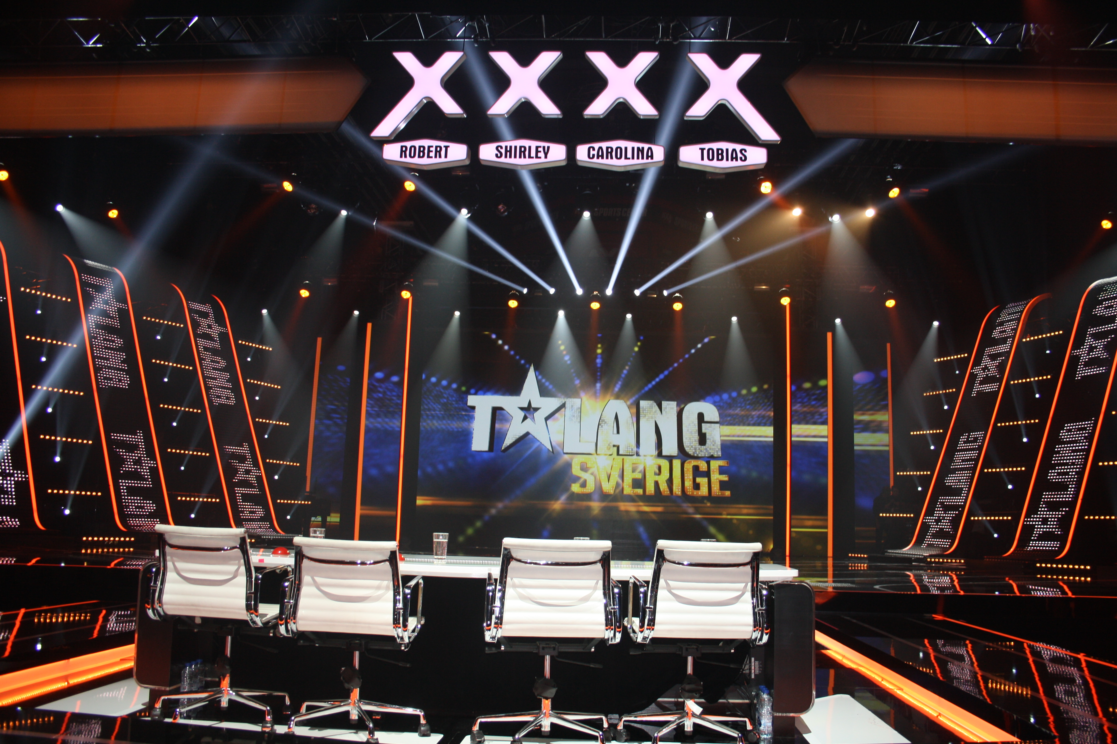 Studion för Talang Sverige 2014